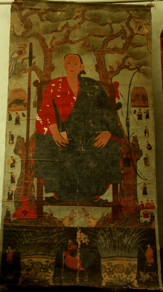 Đây là bức chân dung khổ lớn được lưu tại từ đường nhà họ Vũ tại xã Đại An, huyện Vụ Bản, tỉnh Nam Định. Bức tranh có kích thước khá lớn, dài 198x98cm, bằng vải bố dày 3 lớp được bồi biểu chồng lên nhau, mặt sau quét lớp sơn ta khiến cho phần hậu của tranh khá cứng cáp. Tranh vẽ theo dạng trục cuốn bằng chất liệu bột màu trộn dầu chẩu khiến màu tranh qua 4 thế kỷ đến nay vẫn còn rất tươi sáng. Tranh mô tả nhân vật chính là Luân Quận Công tức Vũ Công Chấn (1618 - 1689), một võ quan lừng lẫy triều đình thời Lê-Trịnh, người từng được phong đến chức Đô Đốc Kiểm Sự Phủ Đô Đốc Trung Quân, tước Quận Công, khi mất được triều đình gia tặng chức Hữu Đô Đốc.